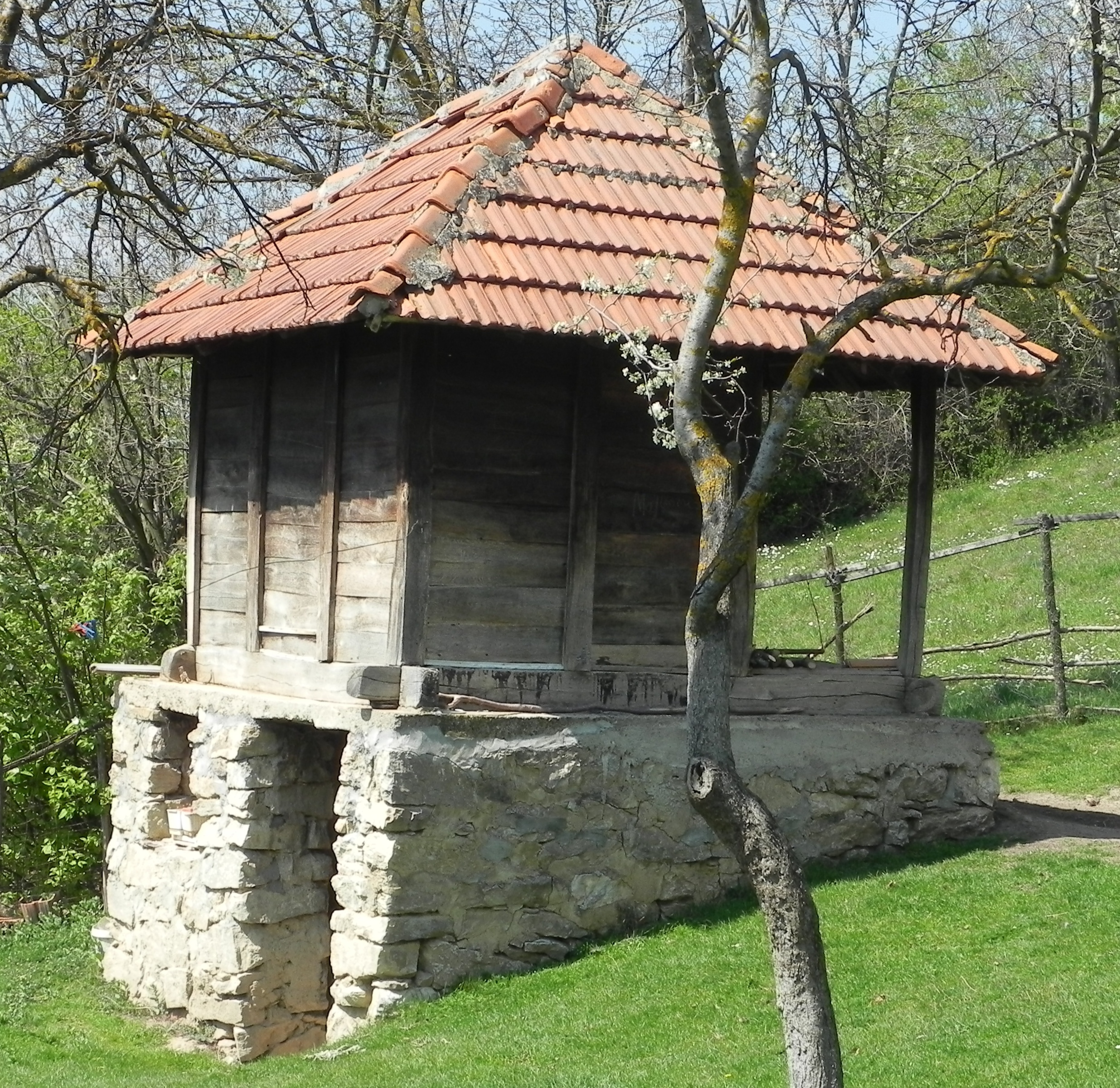 Kompleks Banimi në Milevc (Selim Ismaili)